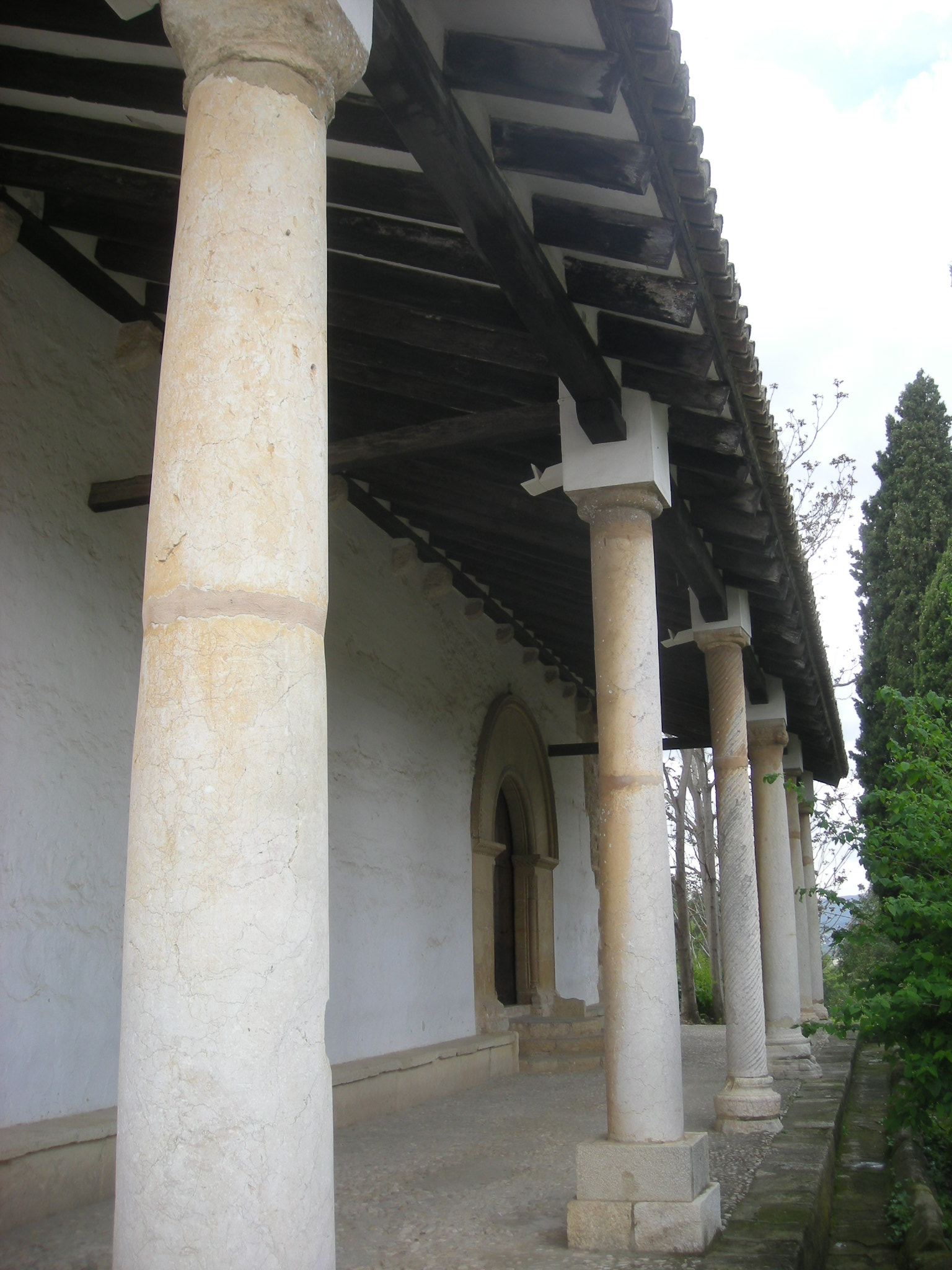 Pòrtic de l'església de Sant Feliu de Xàtiva (segle XIII).